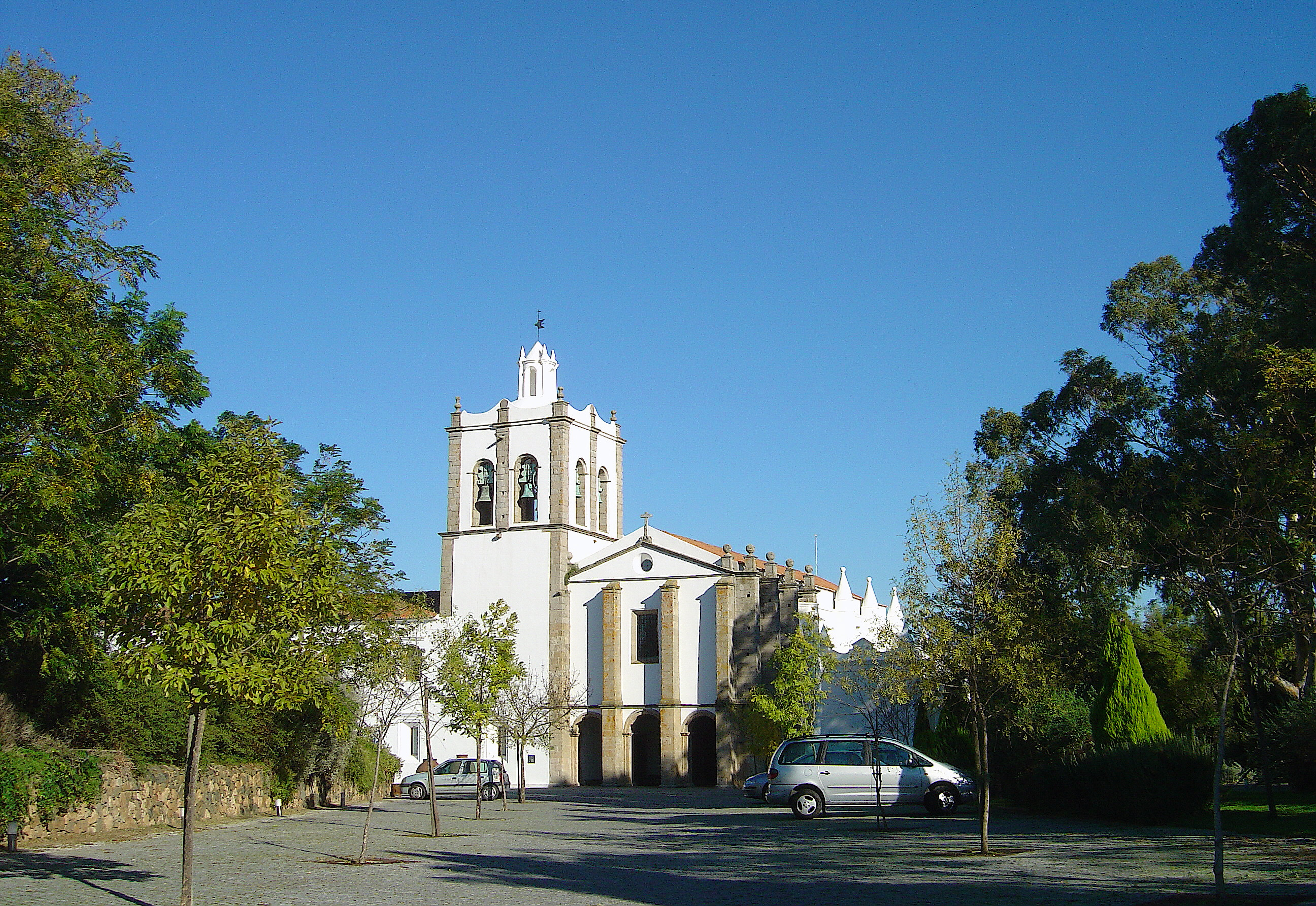 Convento dos Loios - Arraiolos (Portugal)Convento dos Loios - Arraiolos (Portugal)